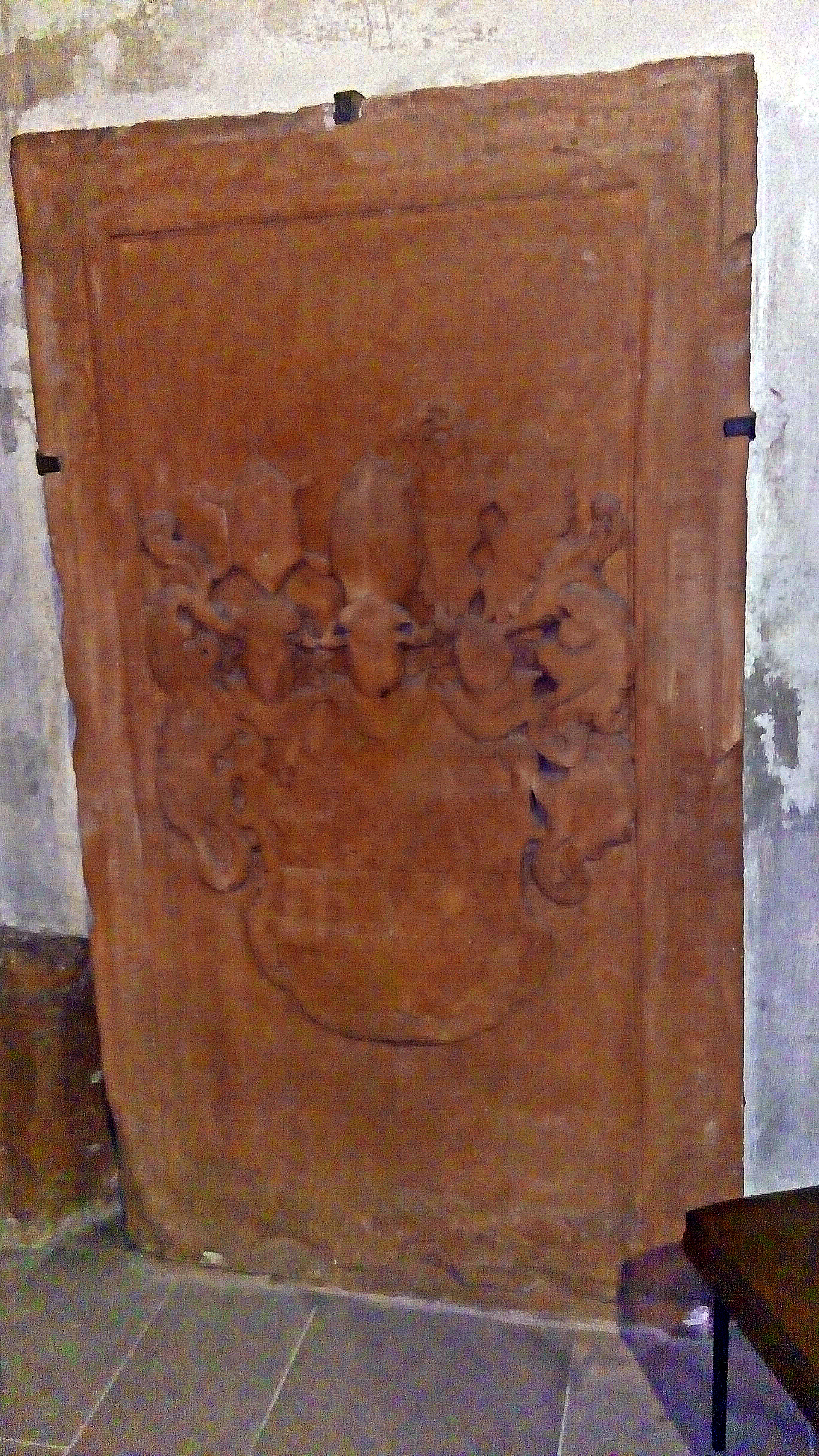 Abgetretene Grabplatte des Wormser Bischofs Hugo Everhard Cratz von Scharfenstein (+ 1663), Worms Liebfrauenkirche